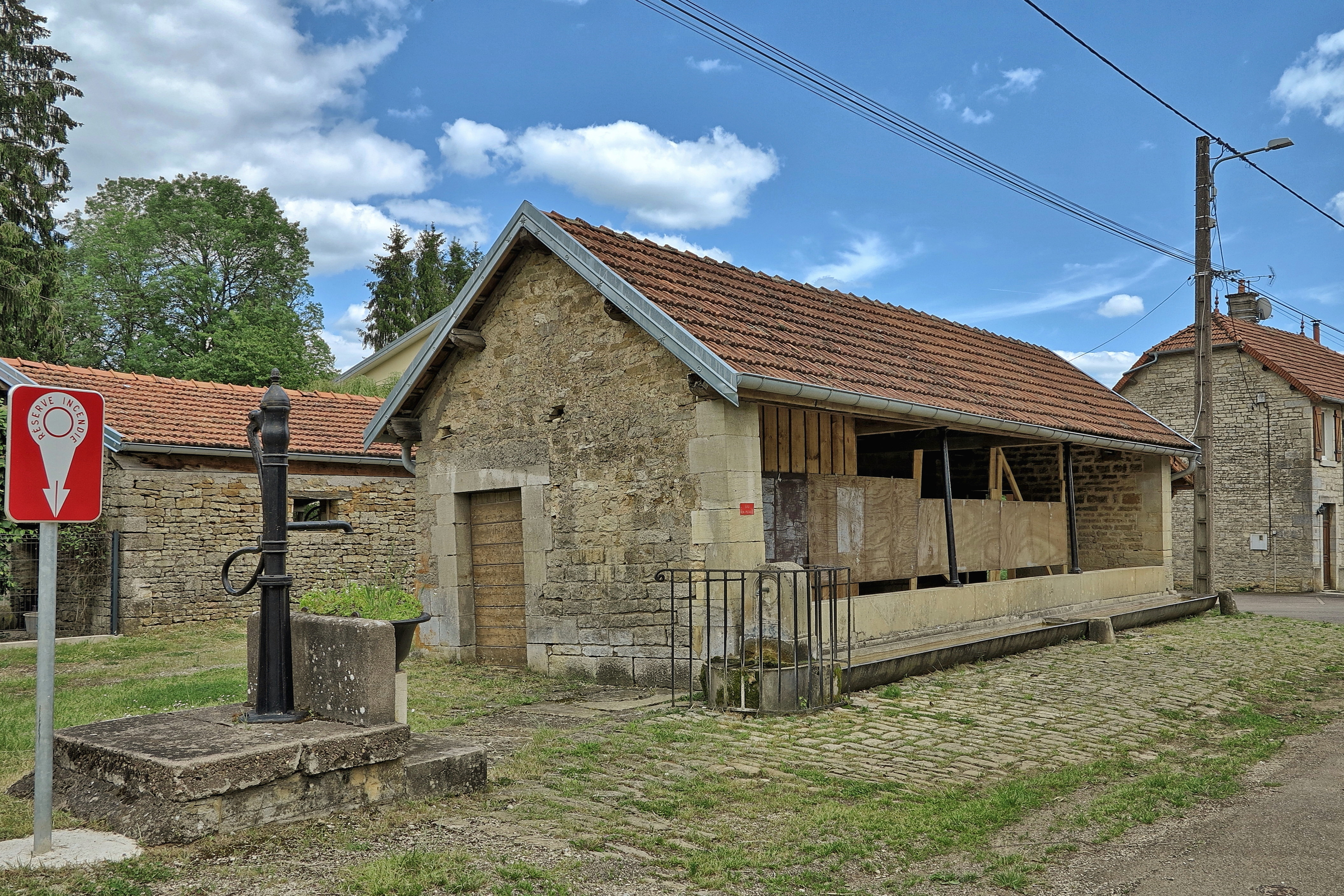 La fontaine-lavoir-abreuvoir